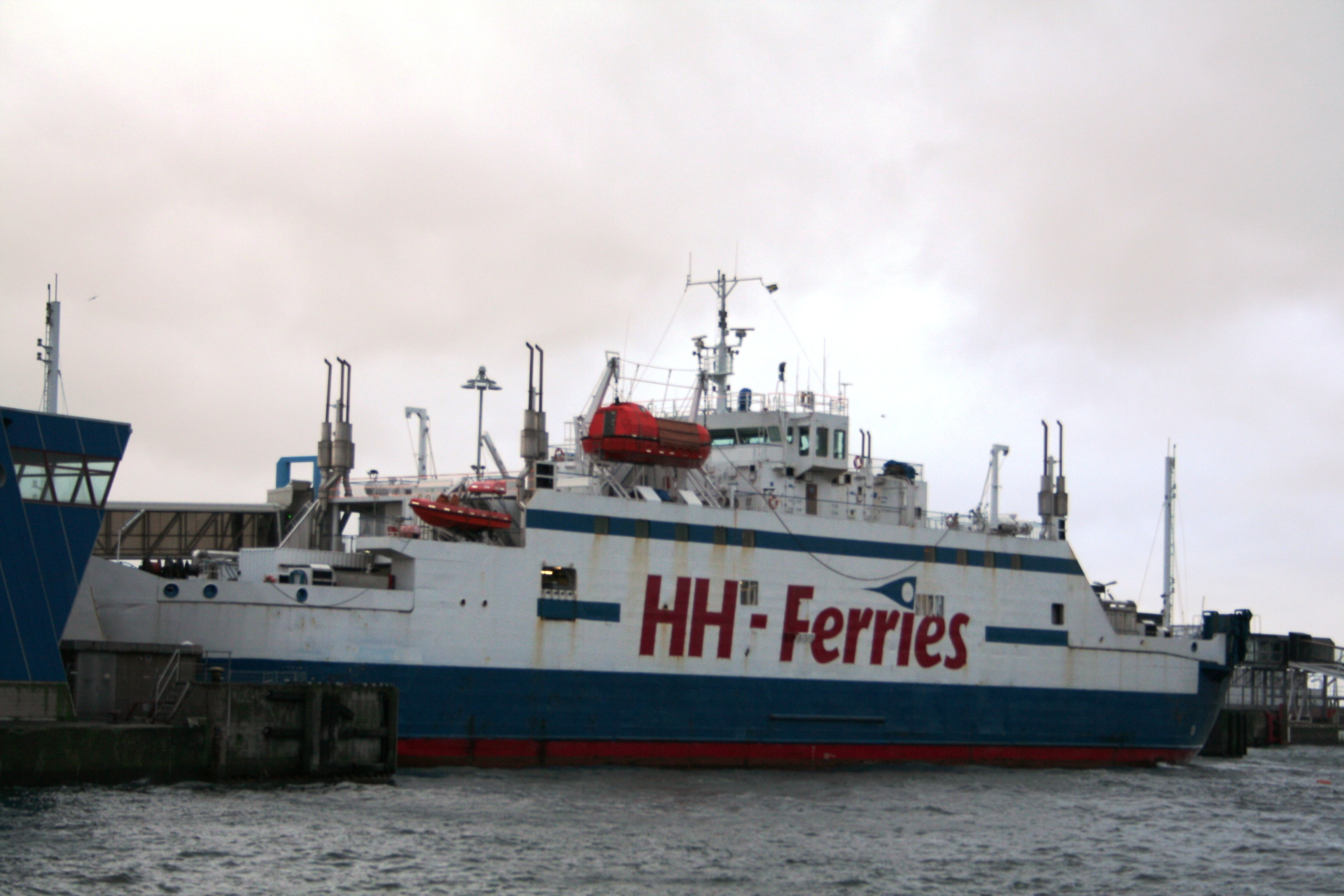 MERCANDIA IV (HH Ferries) on Helsingor-Helsingborg service. Un bateau de la HH-Ferries dans le port d'Helsingborg.